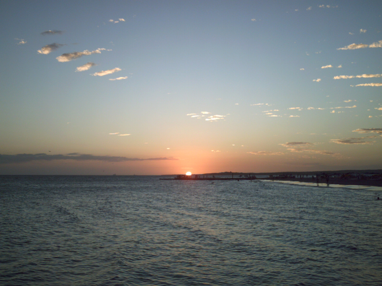 सूर्योदय.